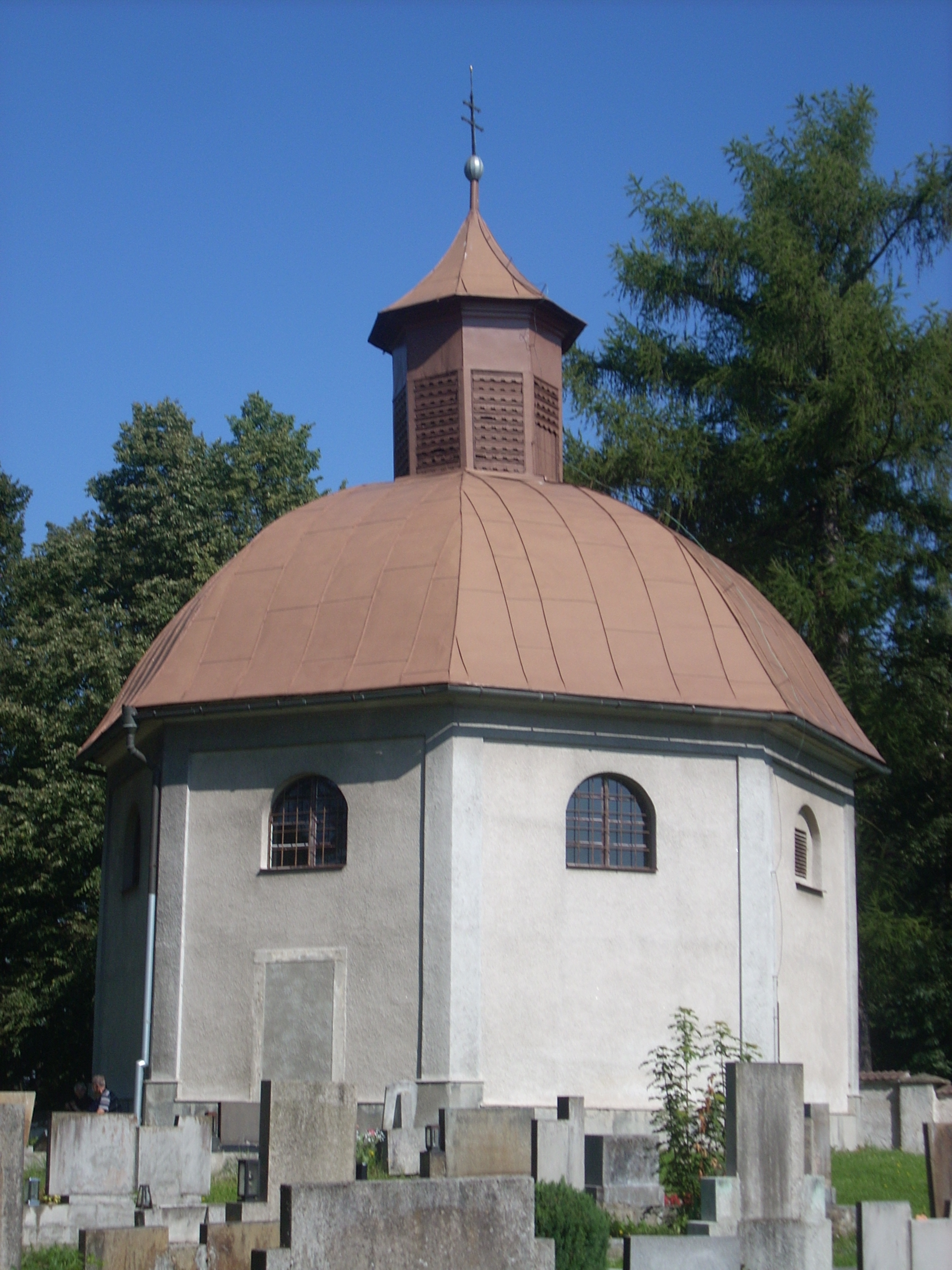 Kostel sv. Floriána, Střítež, okres Jihlava